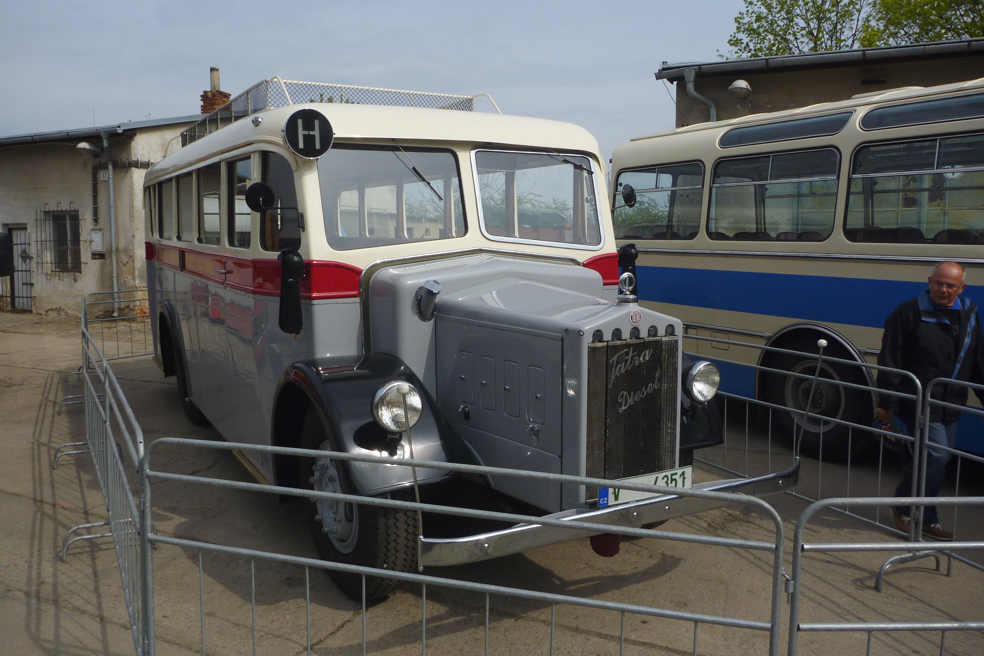 Tatra 27 na DOD v depozitáři TMB v Řečkovicích